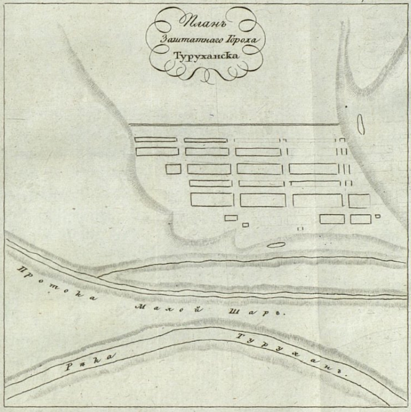 Карта города Туруханск, 1833 год